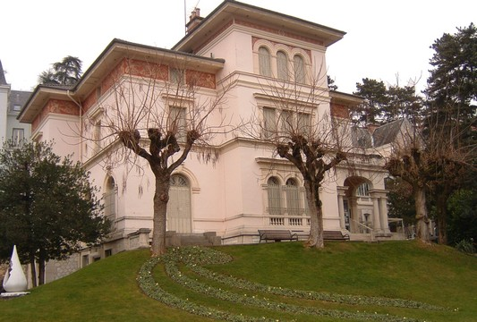 Musée Faure de la ville d'Aix-les-Bains en France dans le département de la Savoie.